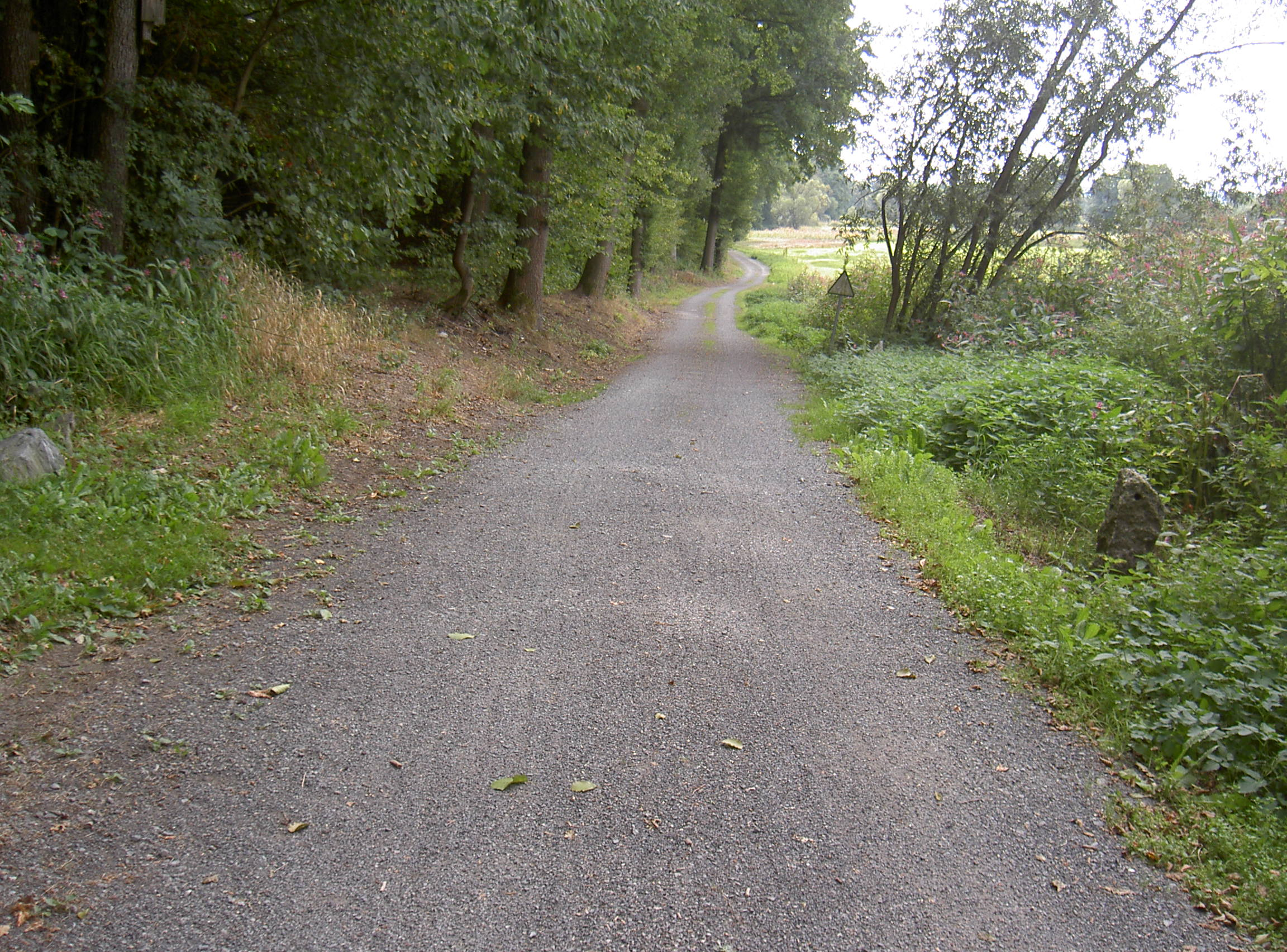 Magdeburger Straße, Straßenbegrenzungssteine